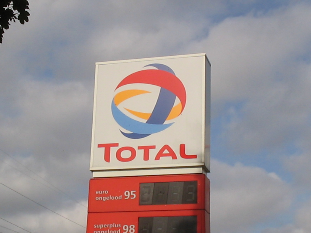 logo Total, Delft, oktober 2005